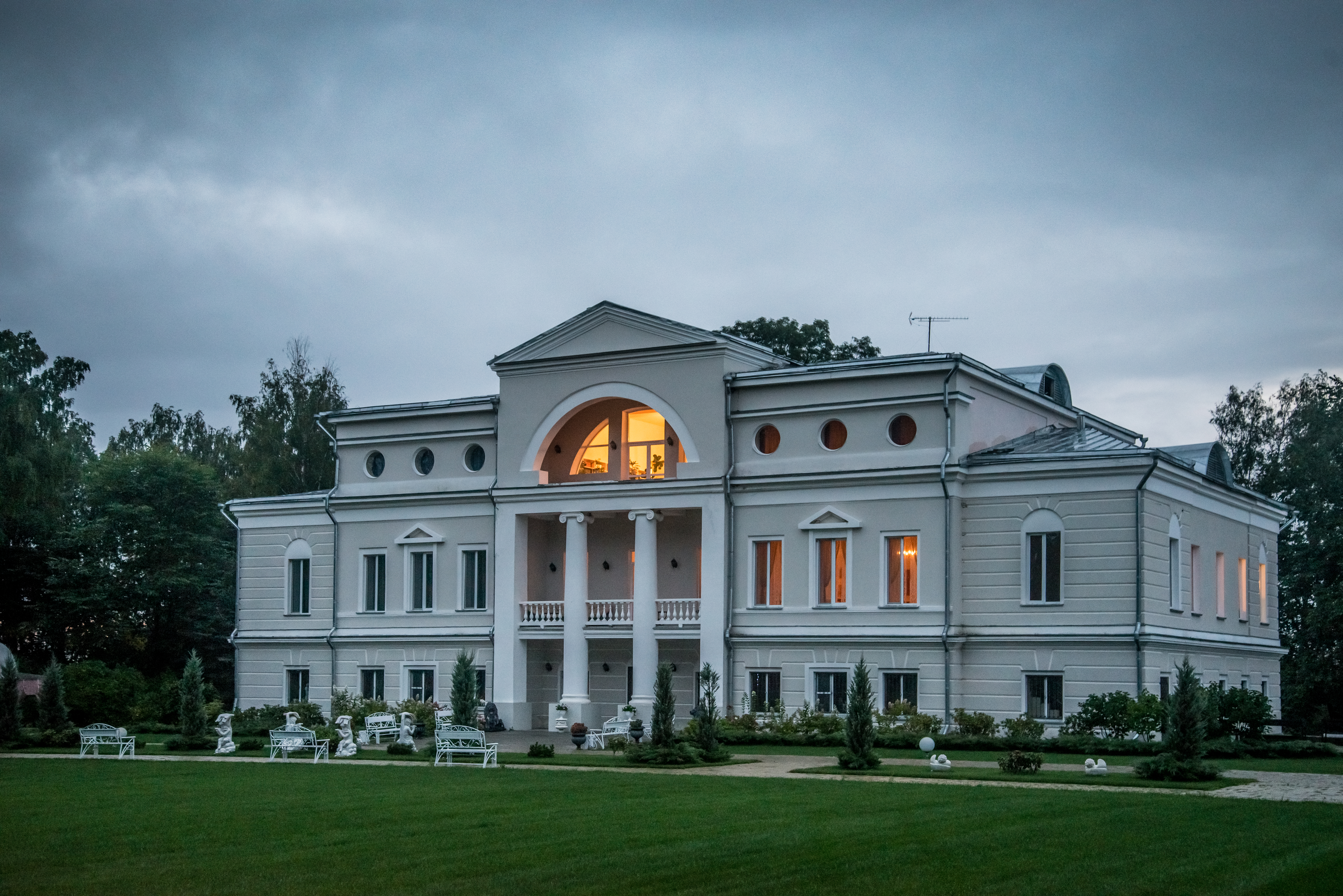 Усадьба Полянских: Герчики, Смоленский район, Смоленская область